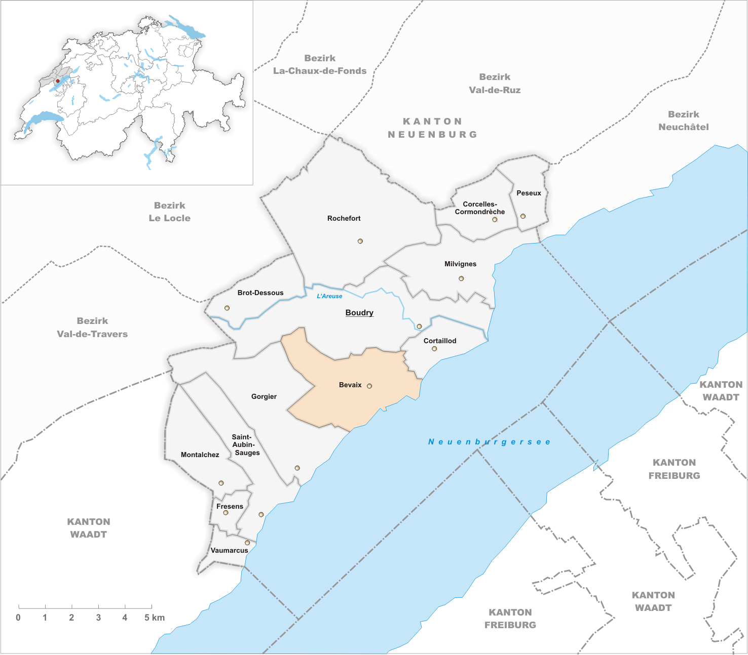 Municipality Bevaix